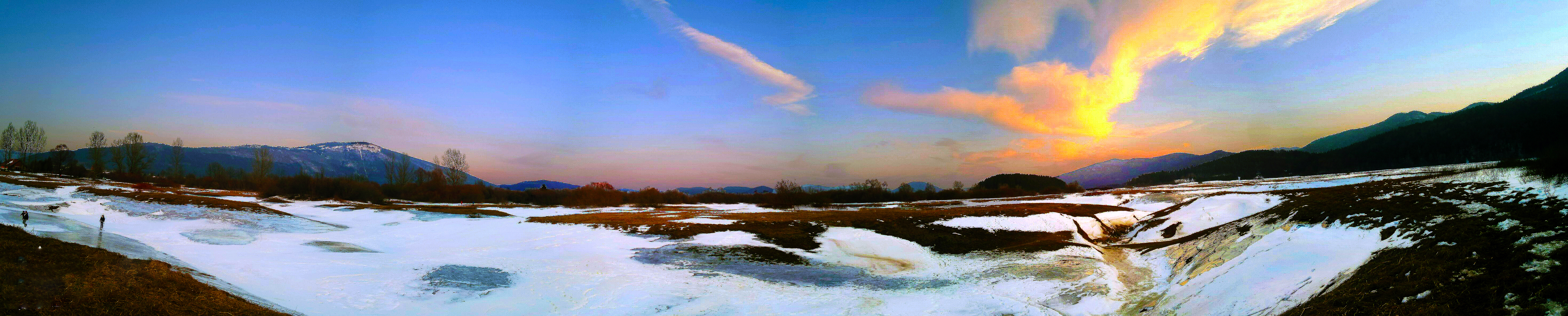 Cerkniško jezero v zimskem času